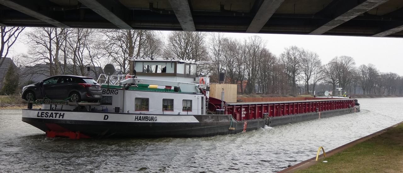 Gütermotorschiff Lesath auf dem Mittellandkanal bei Recke